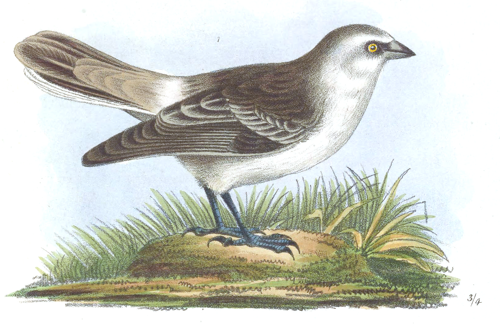 Montifringilla taczanowskii